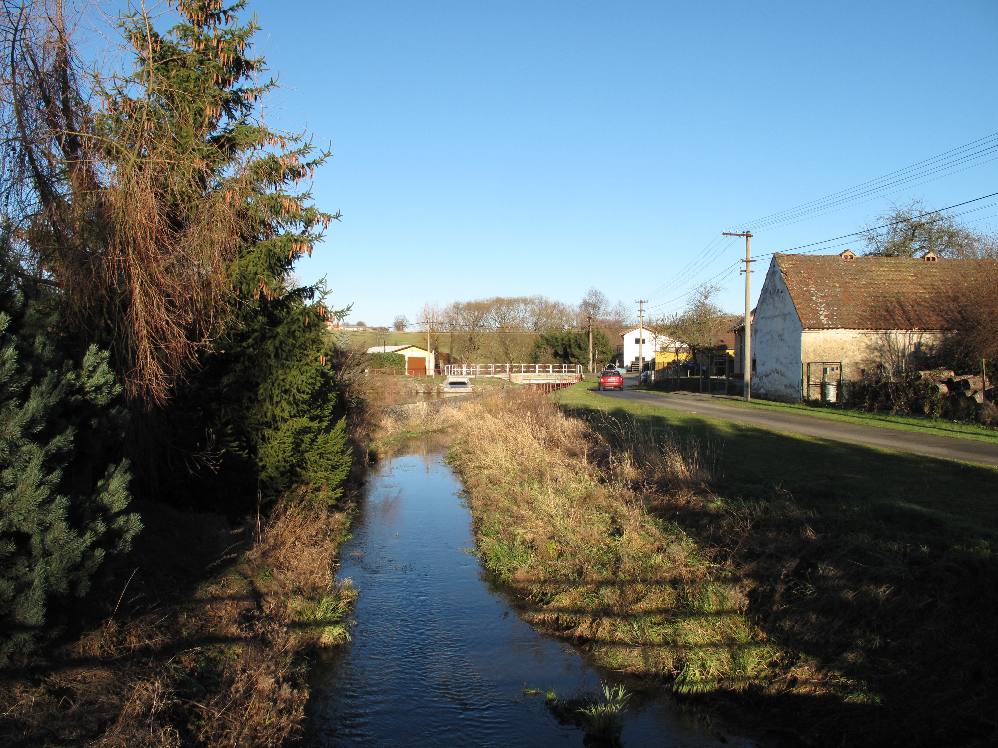 Potok ve Strýčkovicích. Okres Domažlice, Česká republika.